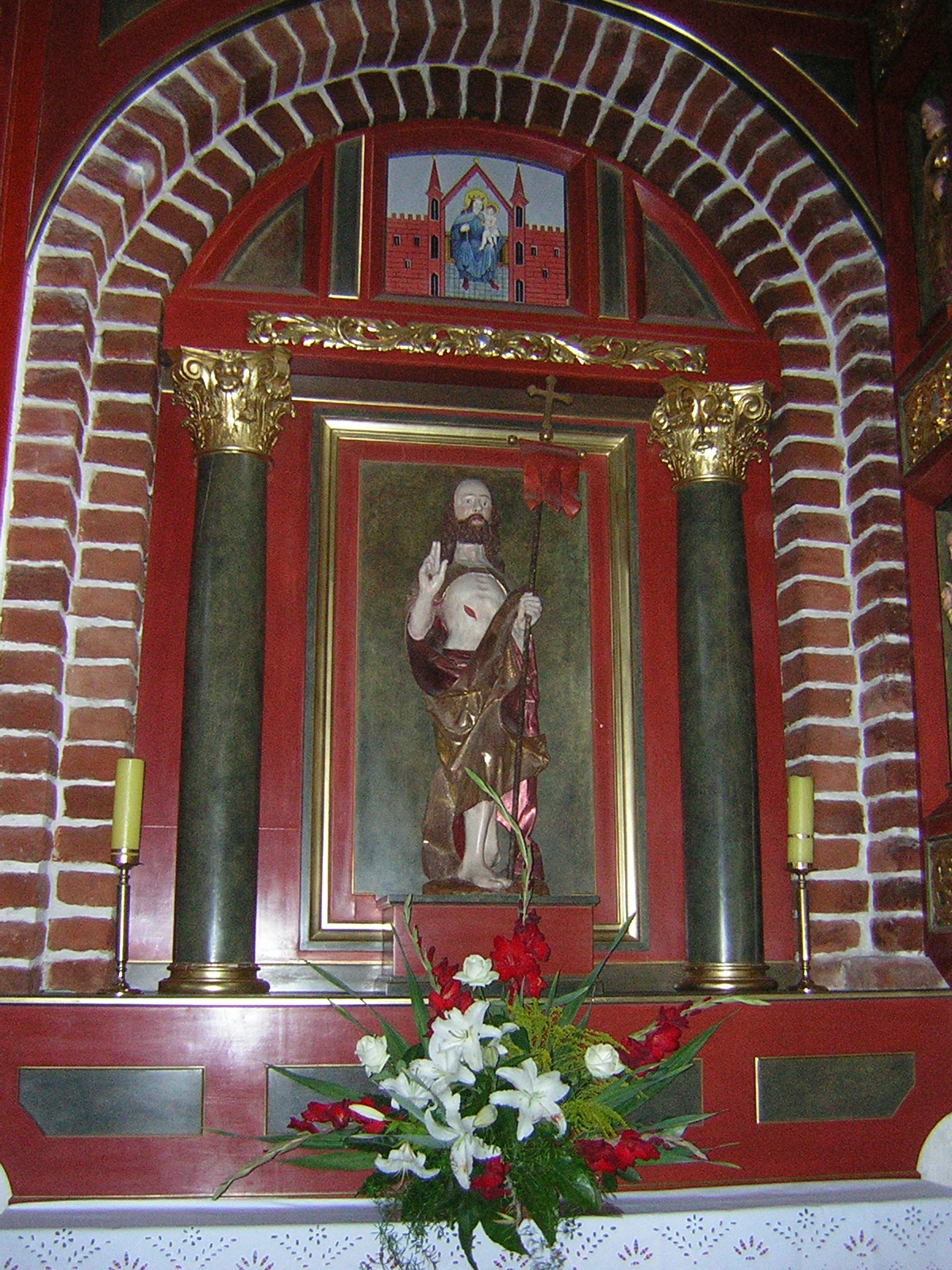 Ołtarz boczny w Kościele Przemienienia Pańskiego w Iławie (fragment}